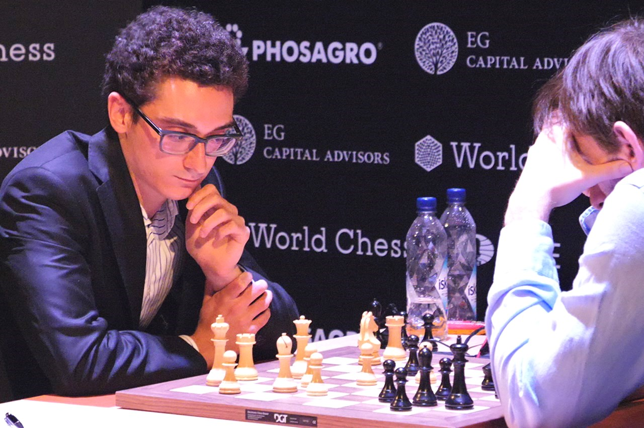 Fabio Caruana beim Kandidatenturnier Berlin 2018 in der 6. Runde gegen Alexander Grischtschuk